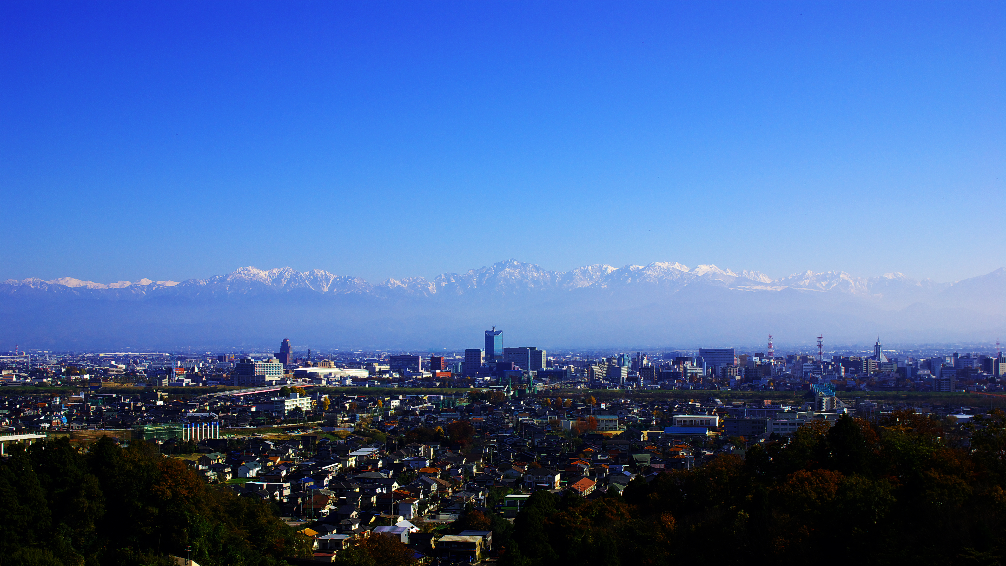 呉羽山からみた富山市街と立山連峰。16:9にトリミング。